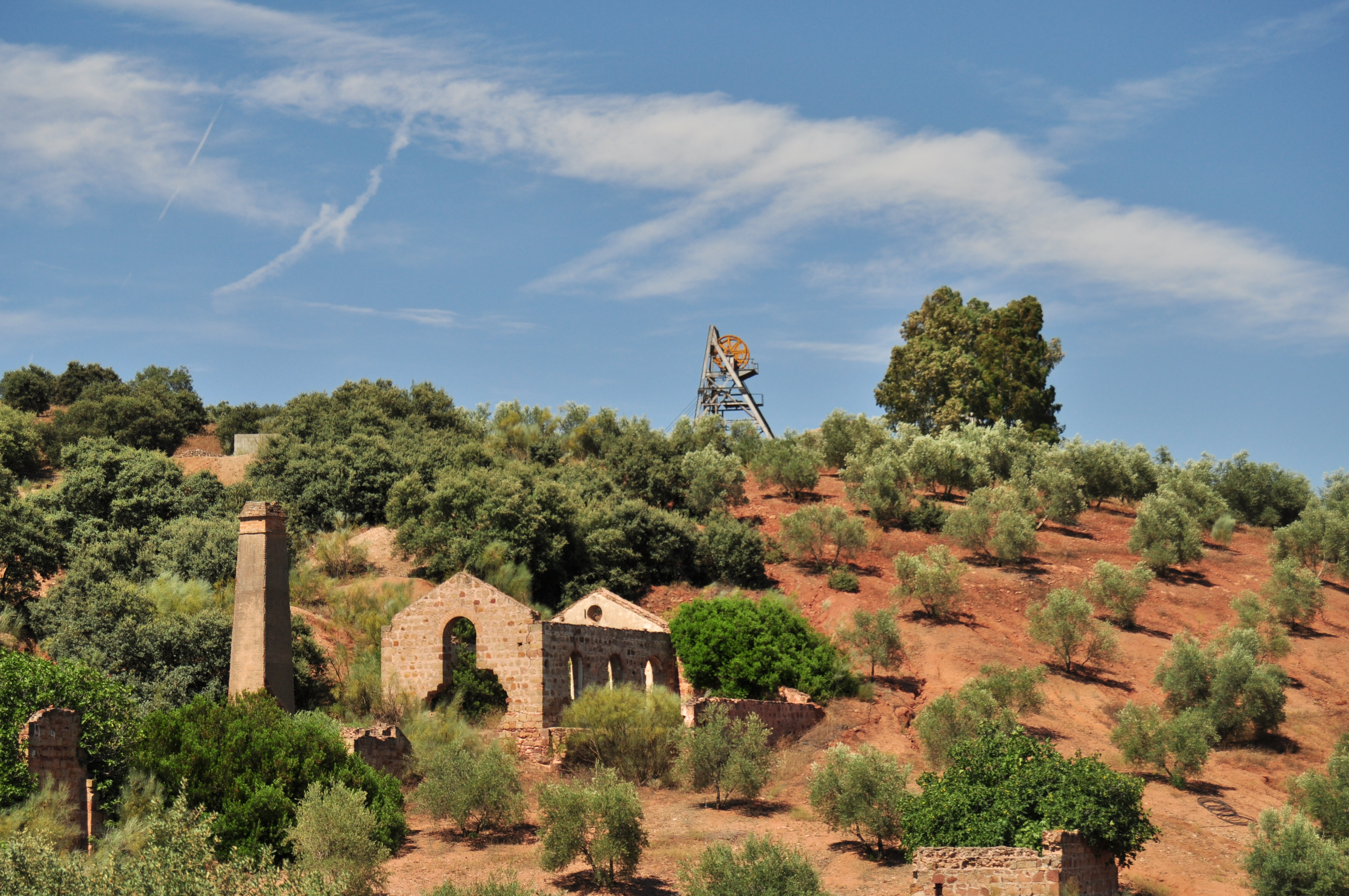 Linares - 035